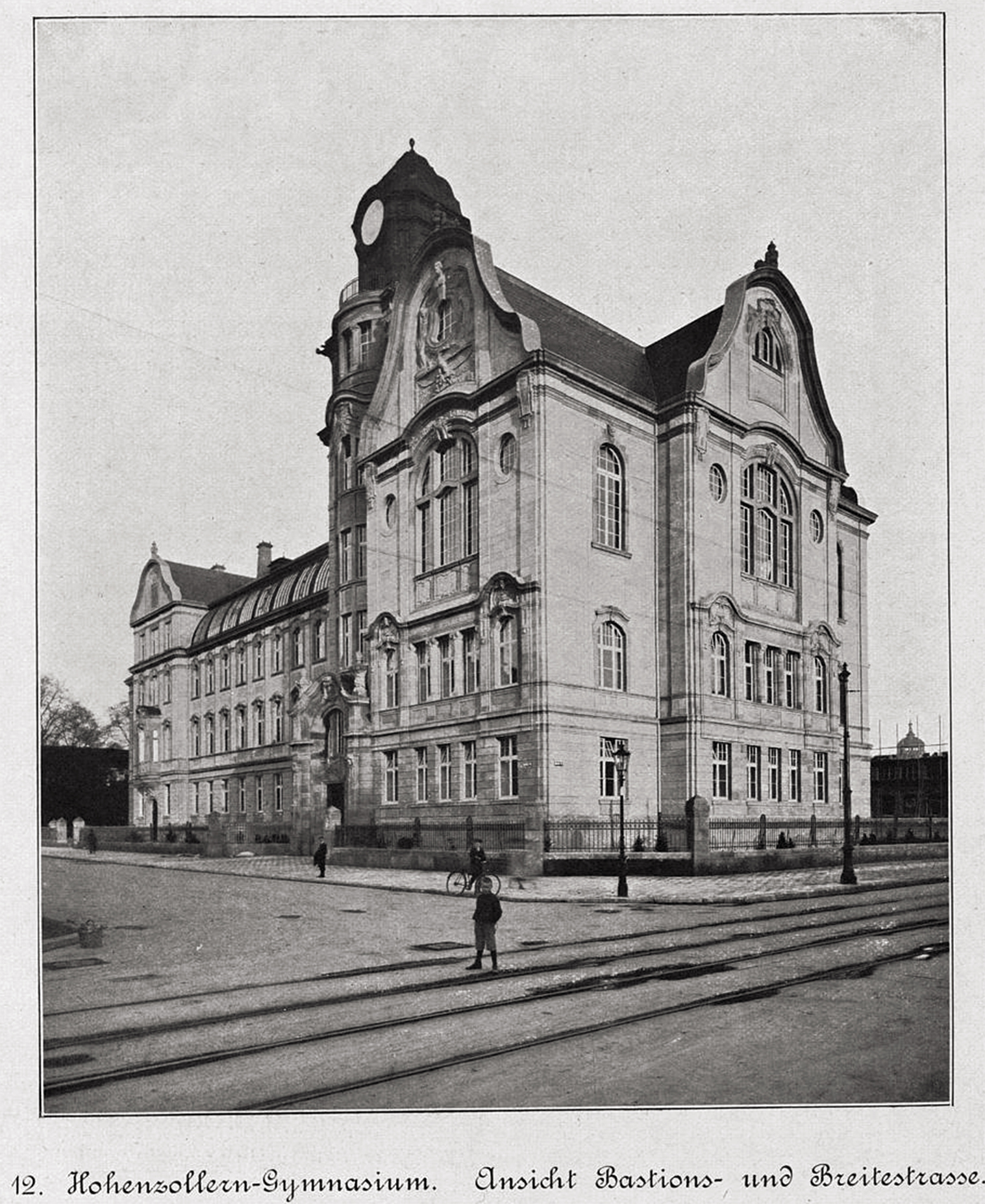 Hohenzollern-Gymnasium (Görres-Gymnasium), Ansicht Bastions- Breitestraße, Foto von 1907